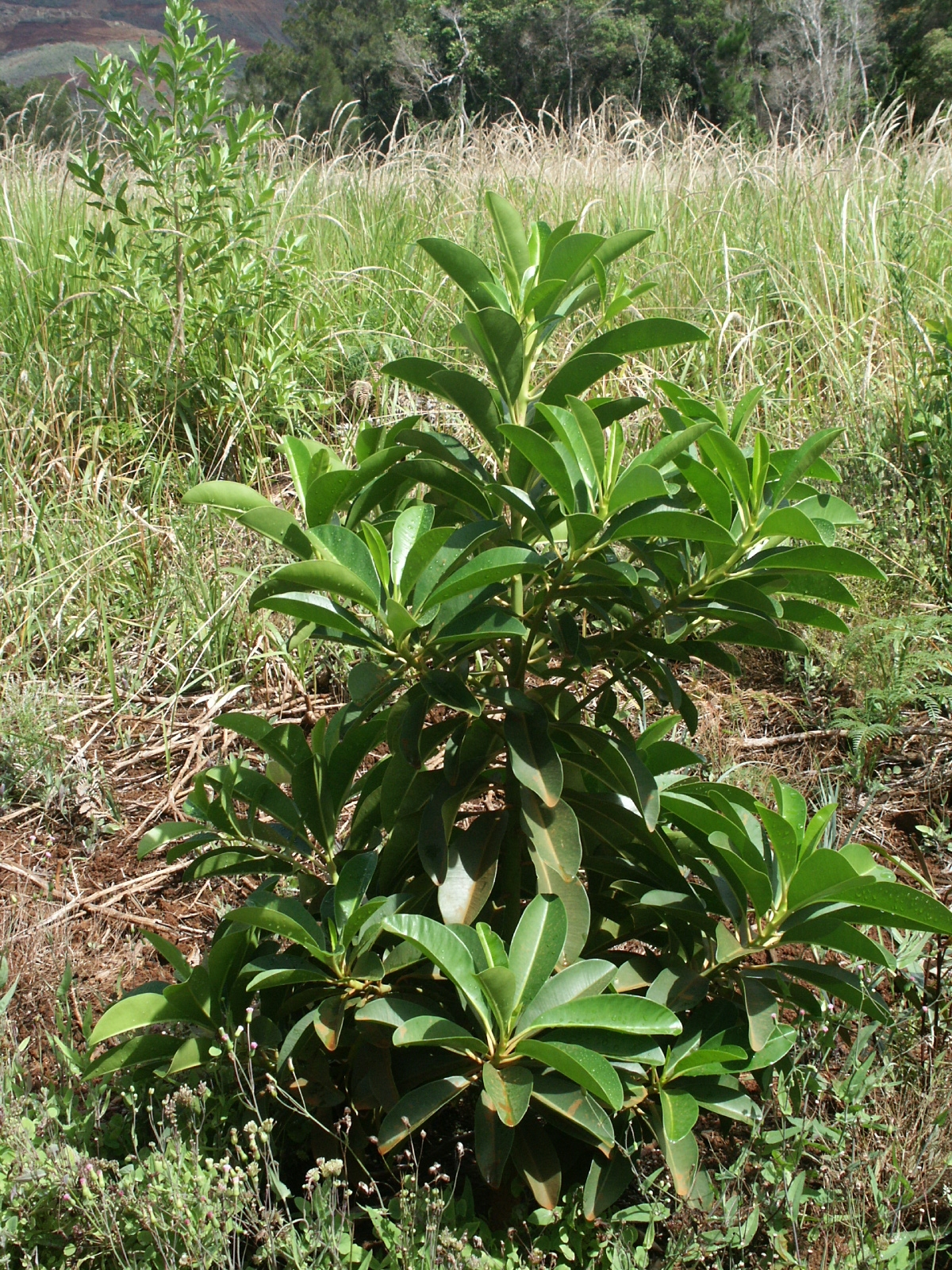 Jeune chêne gomme (Arillastrum gummiferum) en plantation. Il a environ 5 ans. Plantation de "Champ de Bataille" - Sud de Grande Terre. Nouvelle-Calédonie.